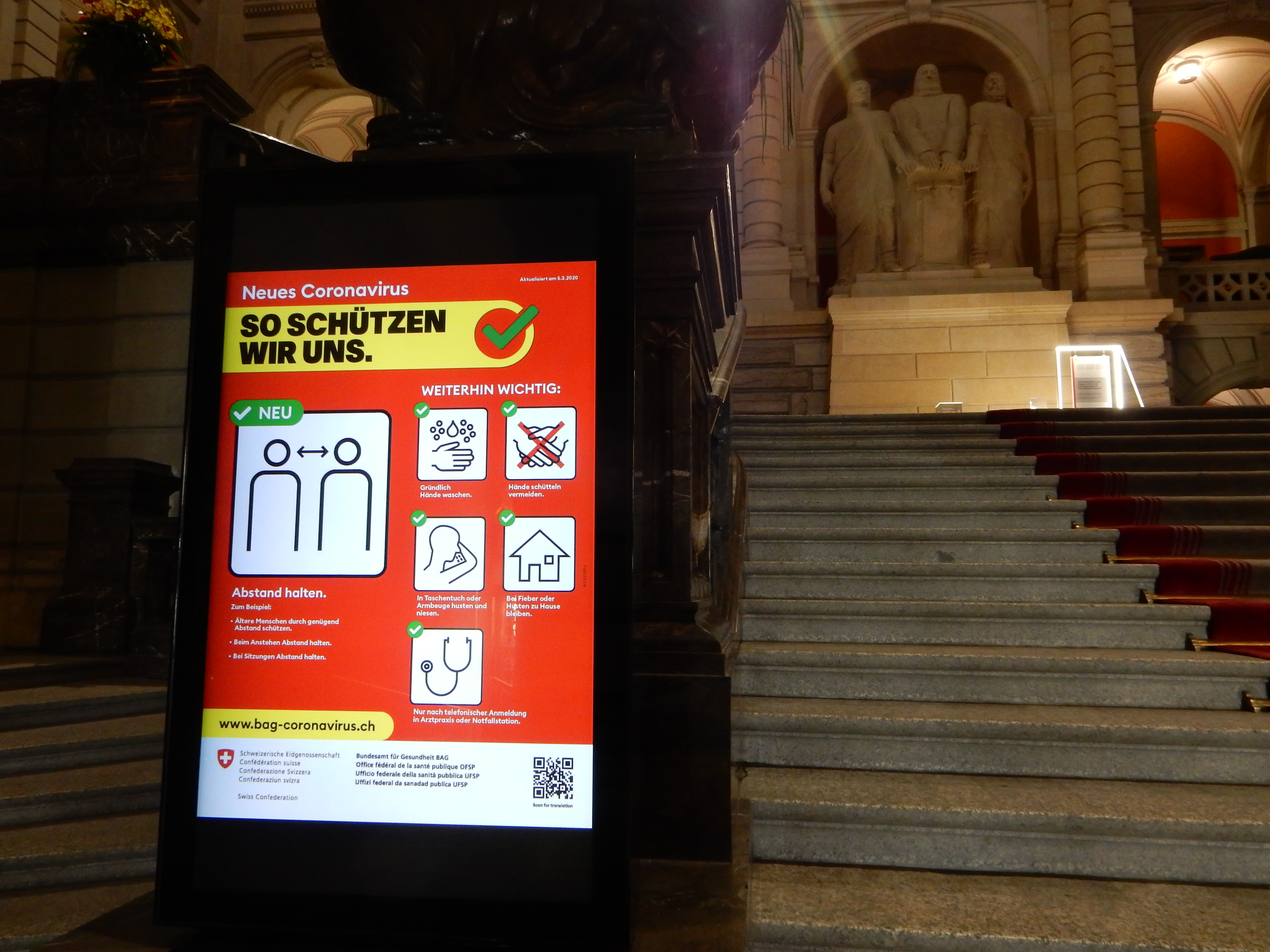 Corona-Schutzmassnahmen Schweiz: in der Kuppelhalle des Bundeshauses